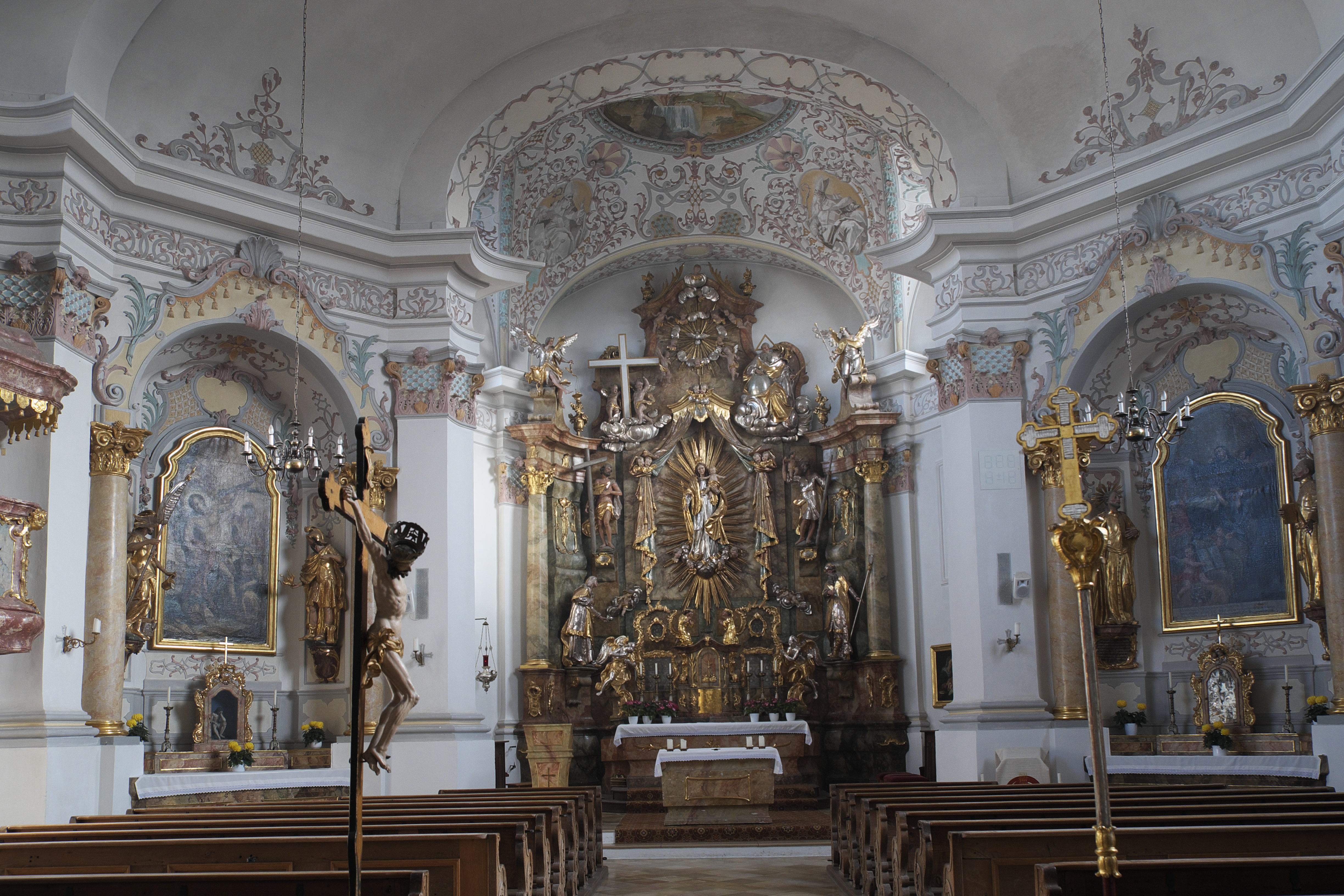 Katholische Pfarrkirche St. Johannes Baptist in Bergkirchen im Landkreis Dachau (Bayern/Deutschland), Chor